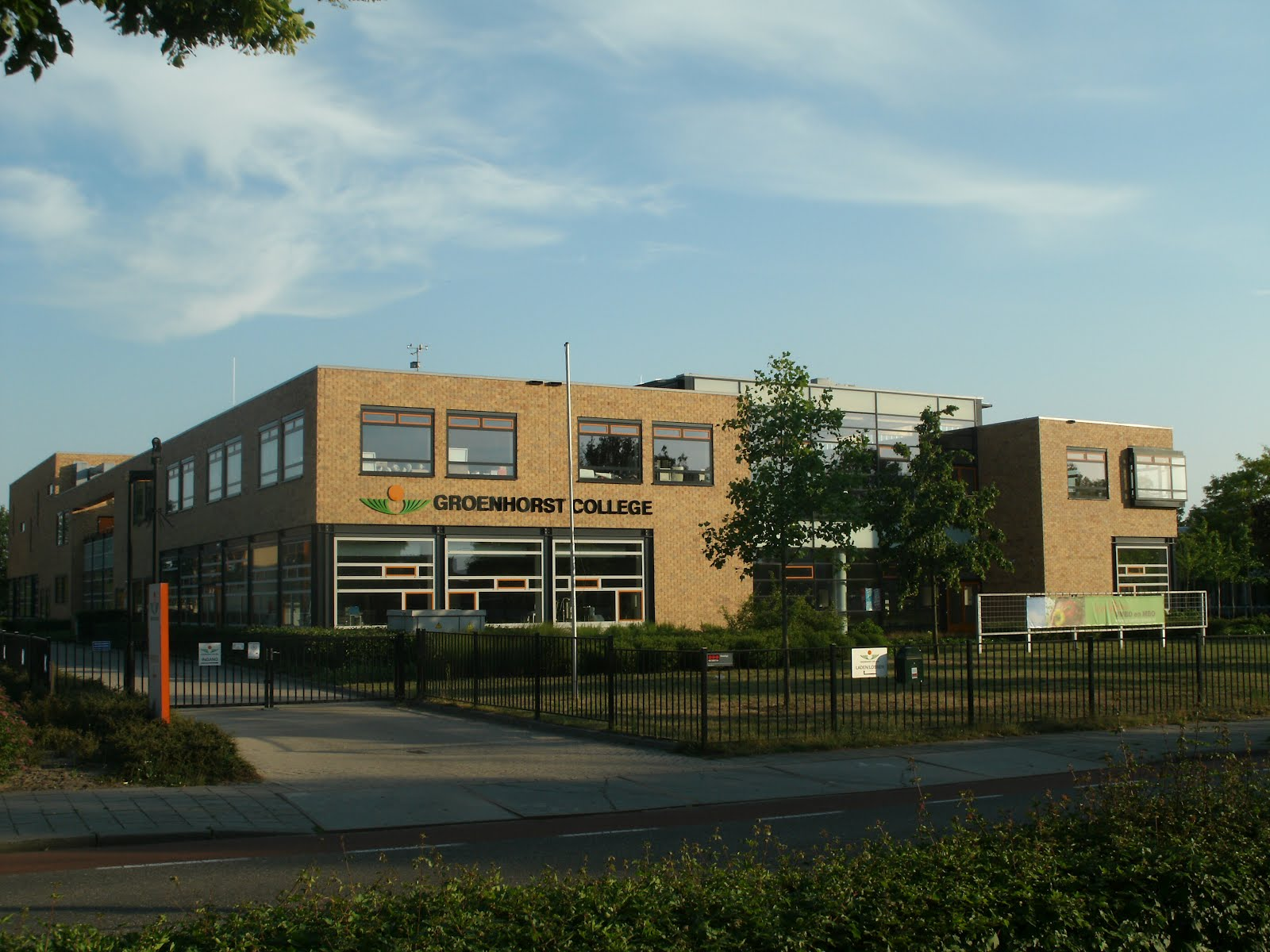 Groenhorstcollege Ede